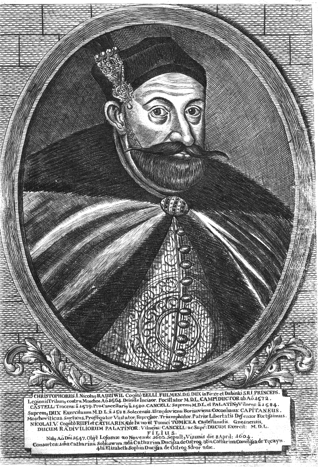 Krzysztof Mikołaj "the Thunderbolt" Radziwiłł